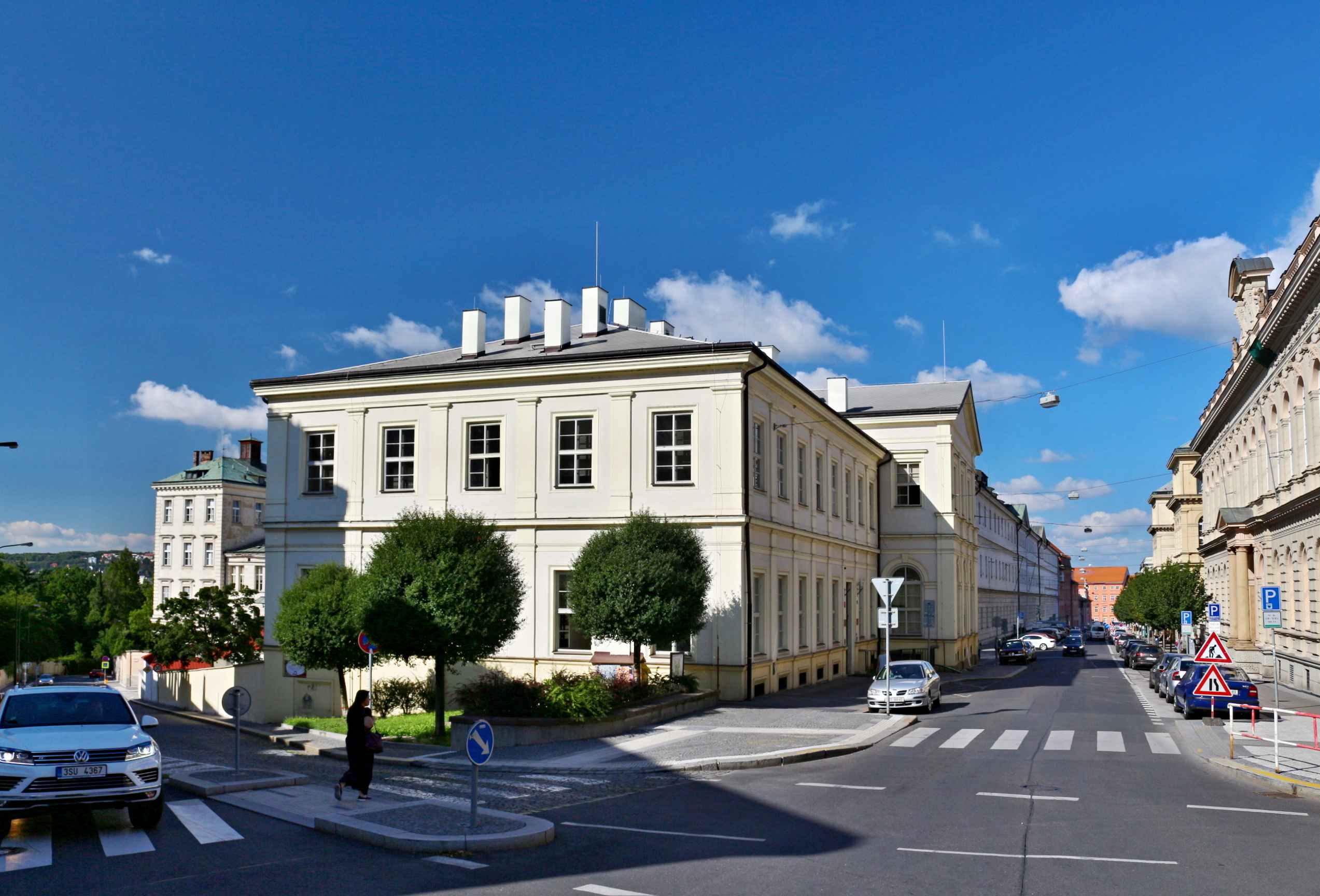 Všeobecná fakultní nemocnice v Praze